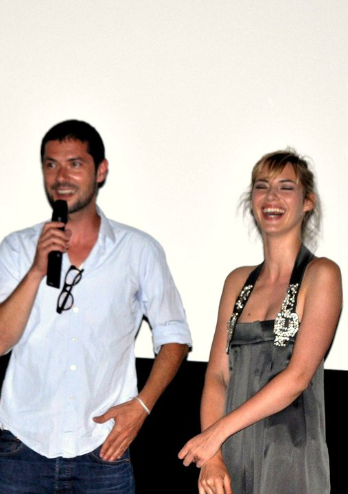 Melvil Poupaud et Louise Bourgoin à l'avant-première du film "L'autre monde".